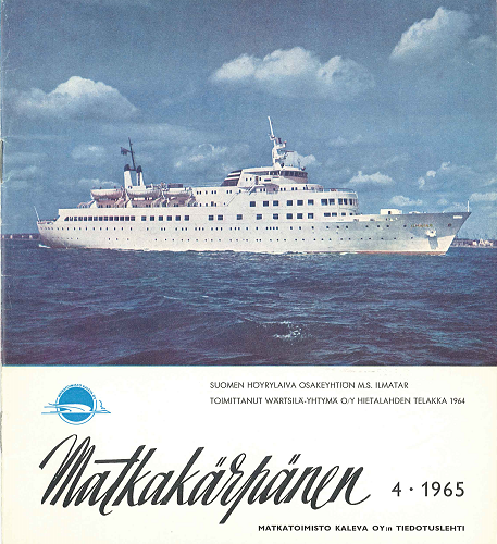 Asiakaslehti